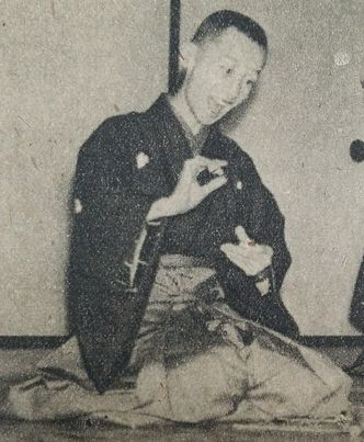 二代目桂小文治